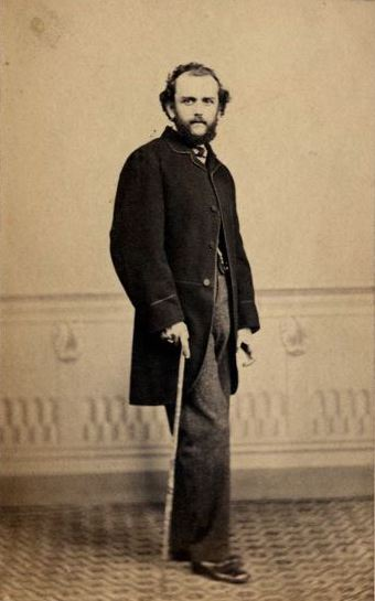 Achille Vertunni